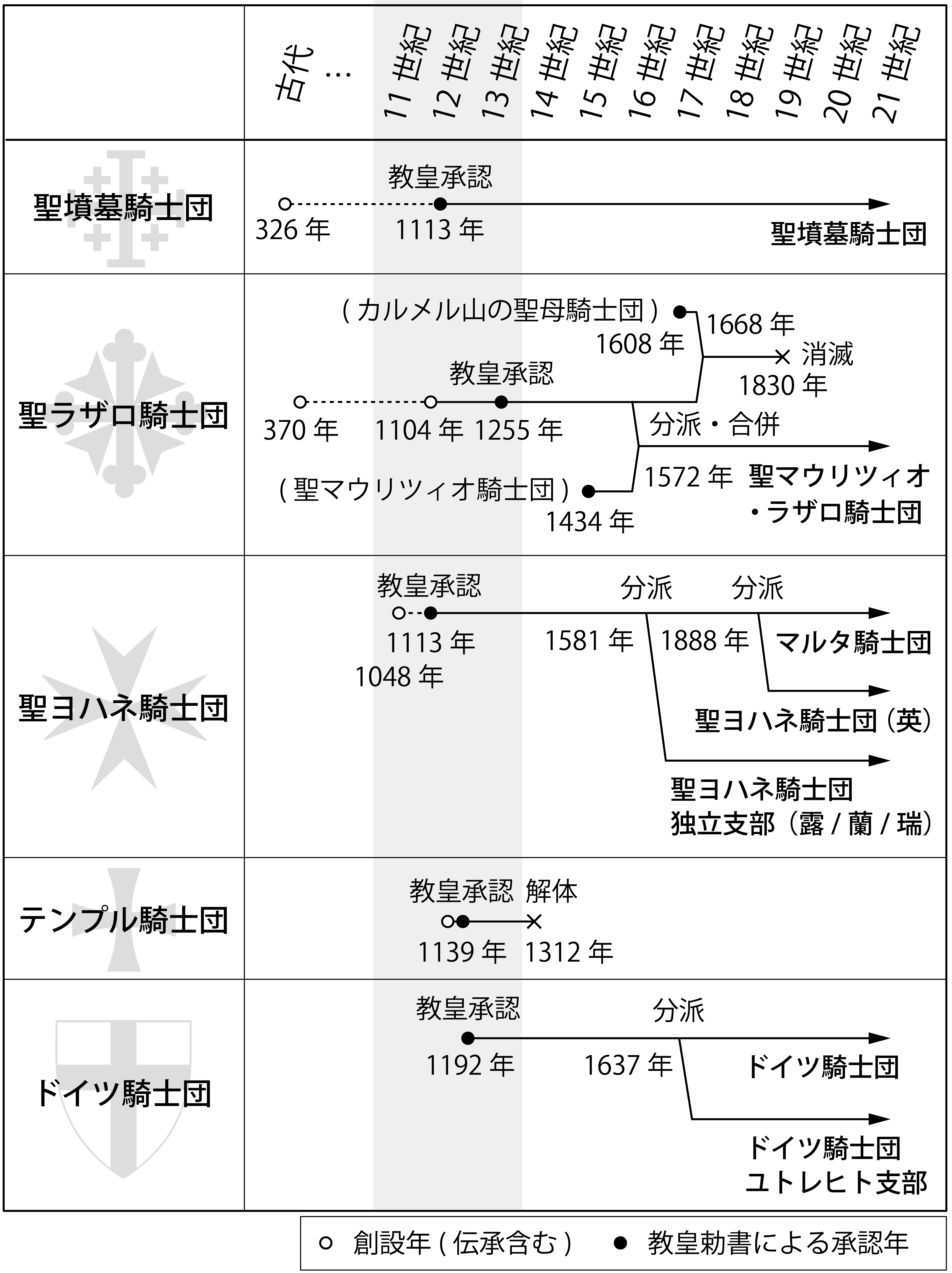 「騎士道」中央公論新社に掲載